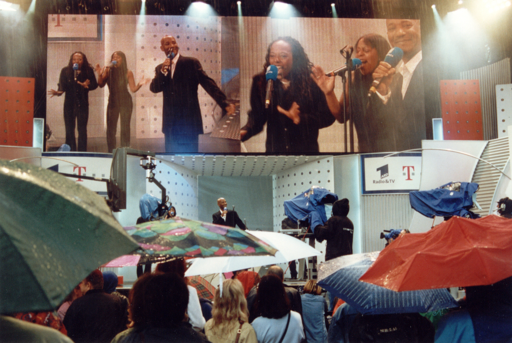 Errol Brown, WDR-Veranstaltung, Köln, Alter Markt, 1998